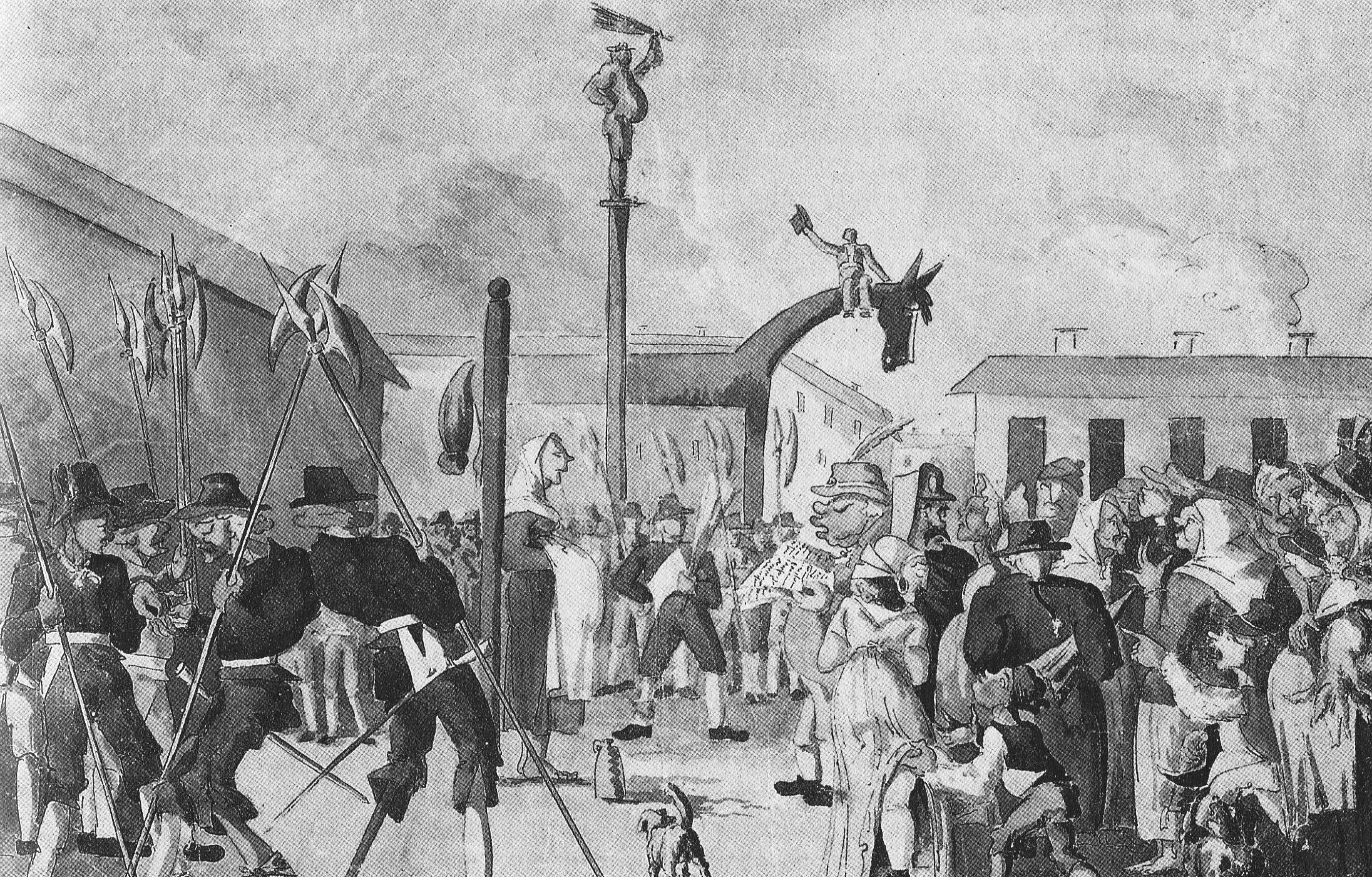 Livet på Packaretorget (Norrmalmstorg)